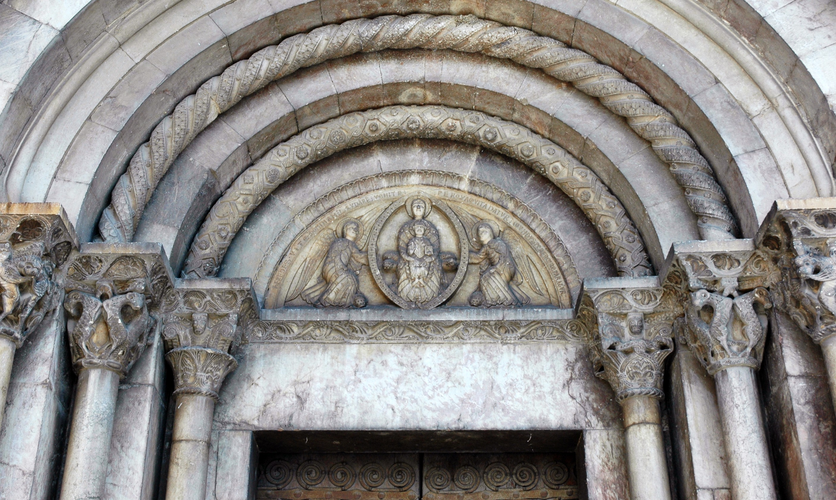 Santa Maria de Cornellà de Conflent - Portalada de cinc arquivoltes amb columnes i capitells esculpits amb els temes del romànic, palmes i lleons. Al timpà de marbre està representada la Mare de Déu en majestat dintre d'una màndorla i flanquejada per dos àngels amb una inscripció en versos llatins: "Heredes vite, Dominam laudare venite, per quam vita datur, mundus per eam reparatur."